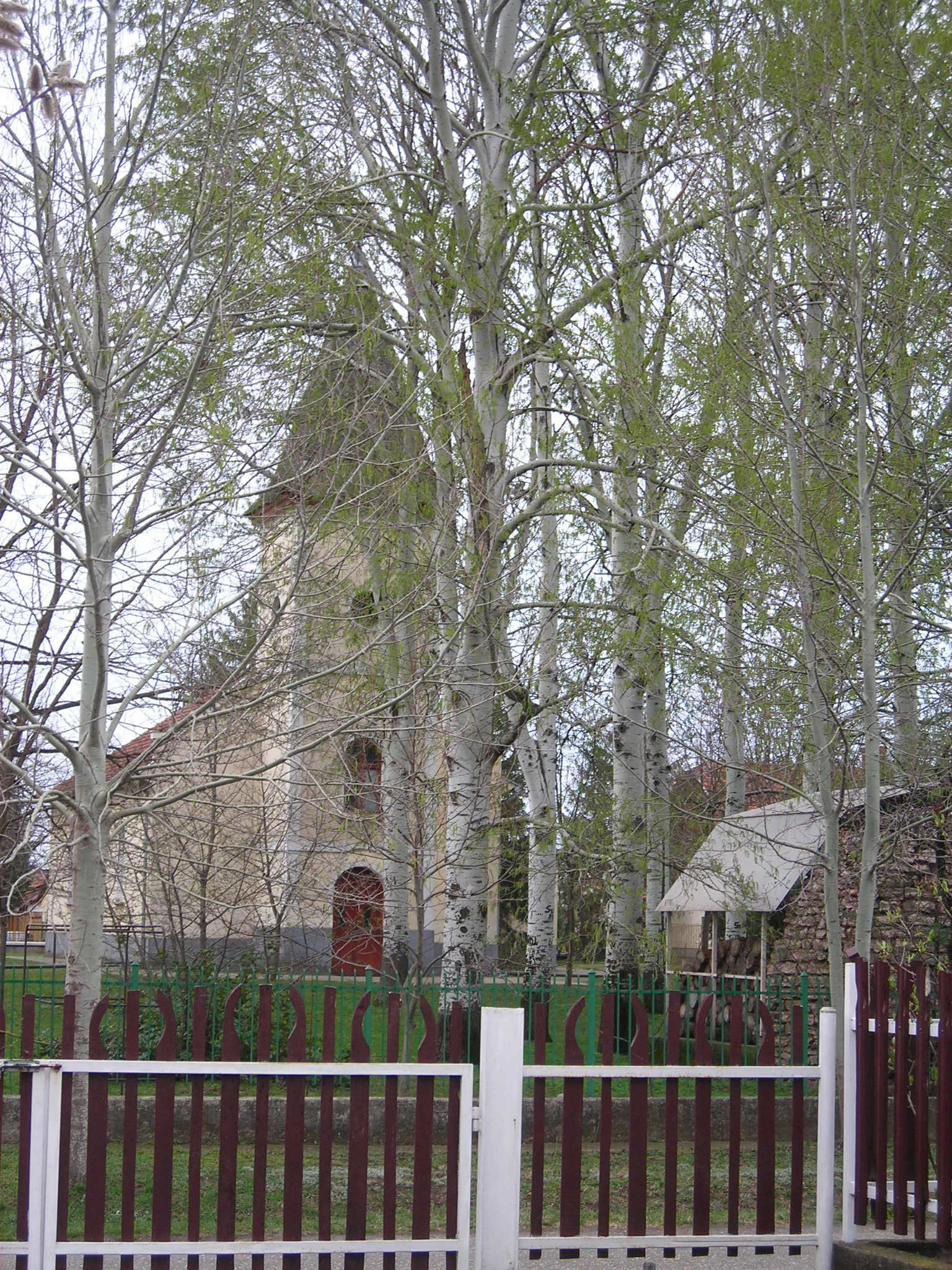 A fülöpjakabi templom